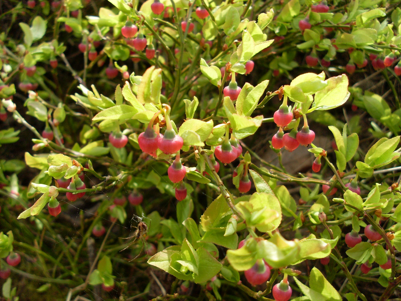 Vaccinium myrtillus